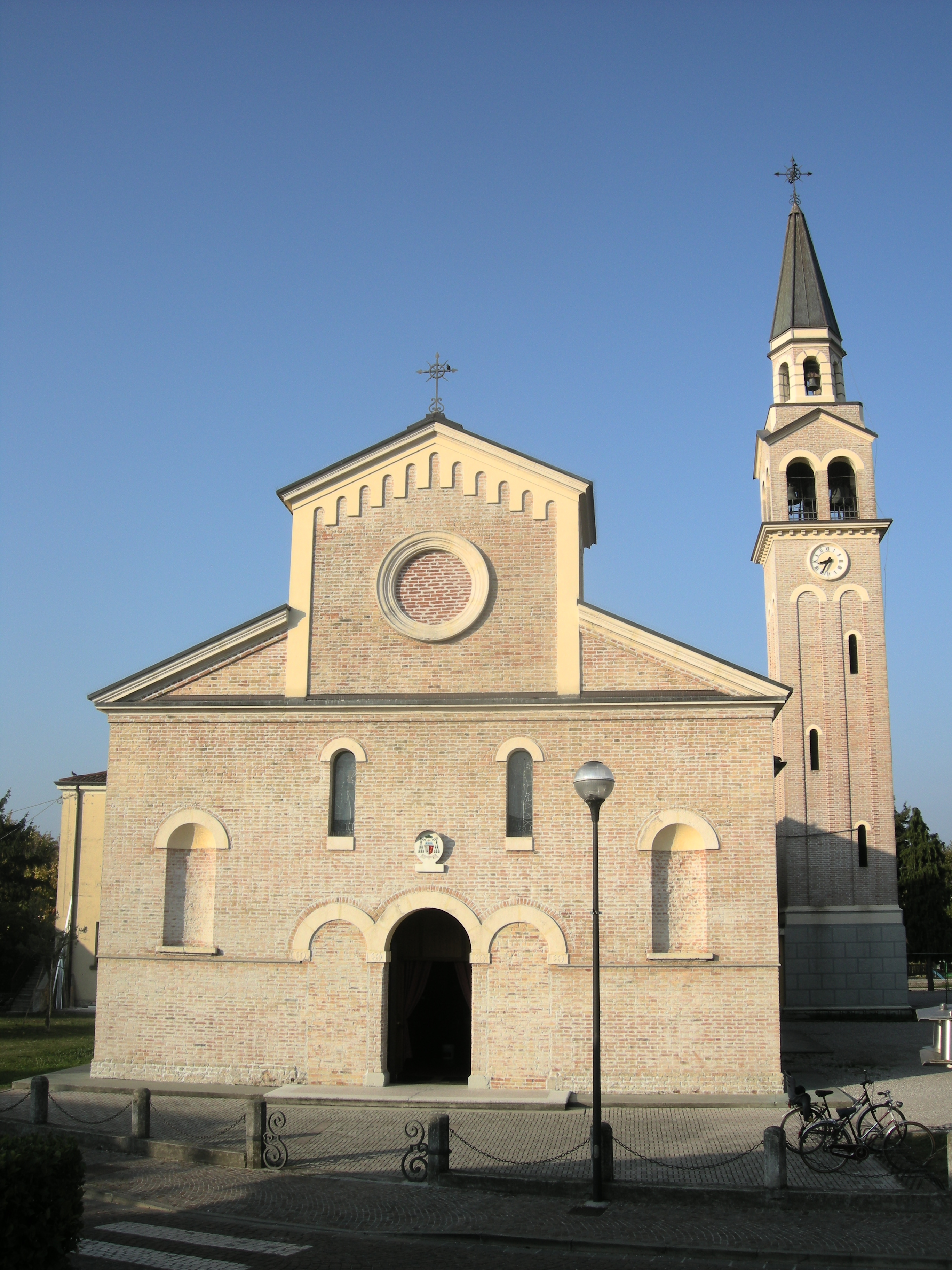 Cervellin, opera propria, Chiesa di Losson della Battaglia - Meolo VE Italy, GFDL lic., data 31.10.2009